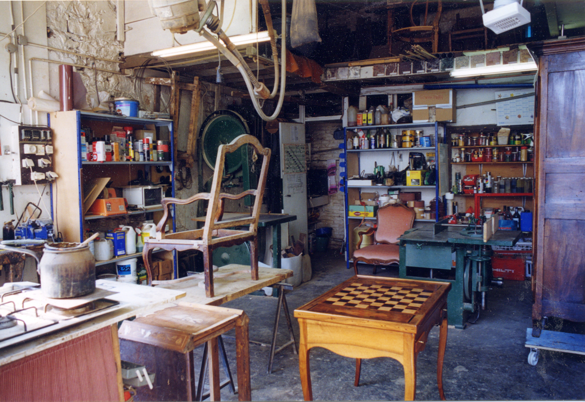 Un atelier de restauration de mobilier. Ateliers Wagner et Chavanis, Lyon, France